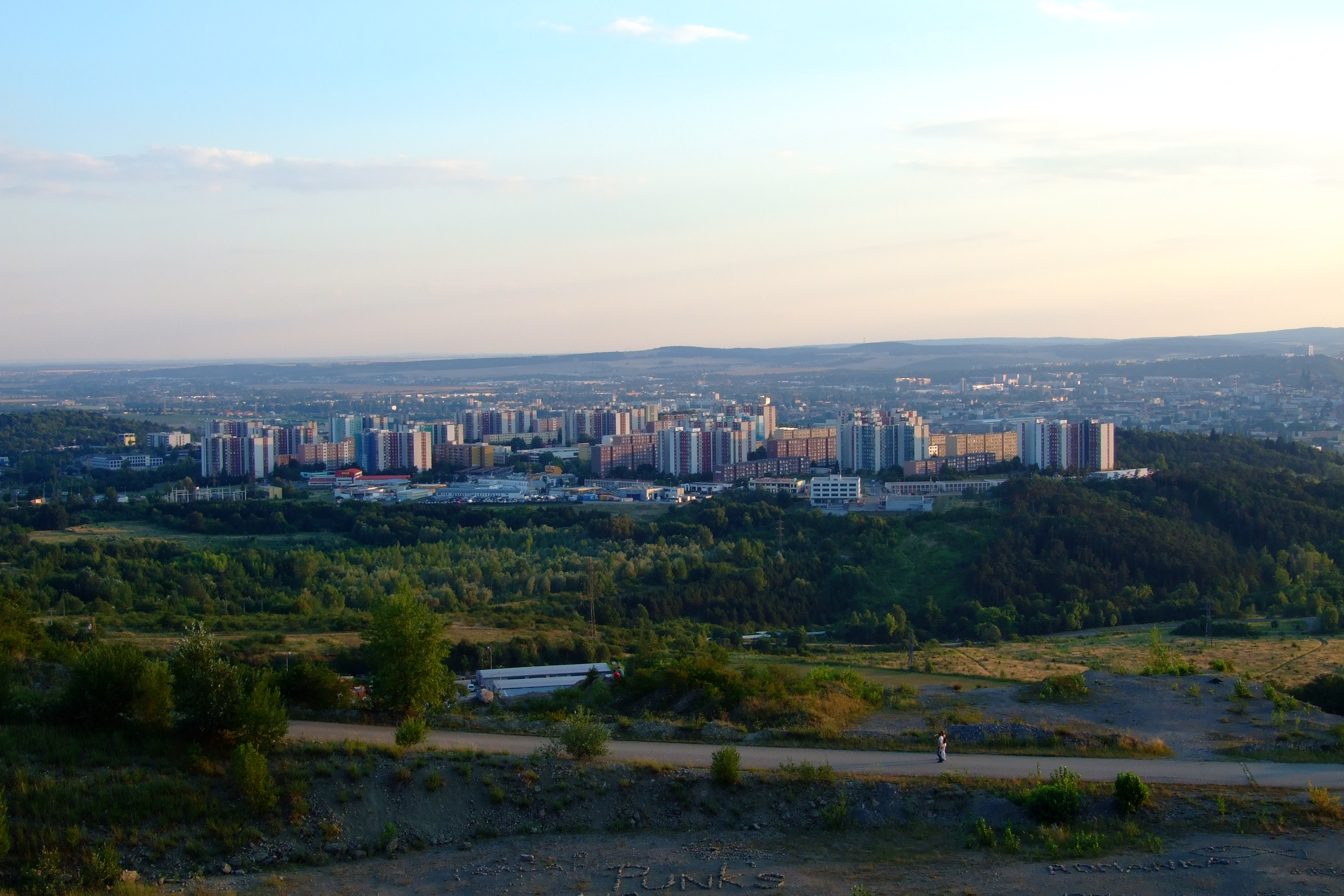 0Pohled na Brno-Vinohrady a přilehlé okolí z Hádů. Brno-Vinohrady je to sídliště v popředí, asi uprostřed fotografie. Vyfotografováno z okraje Růženina lomu, z okrajové části katastrálního území obce Kanice.